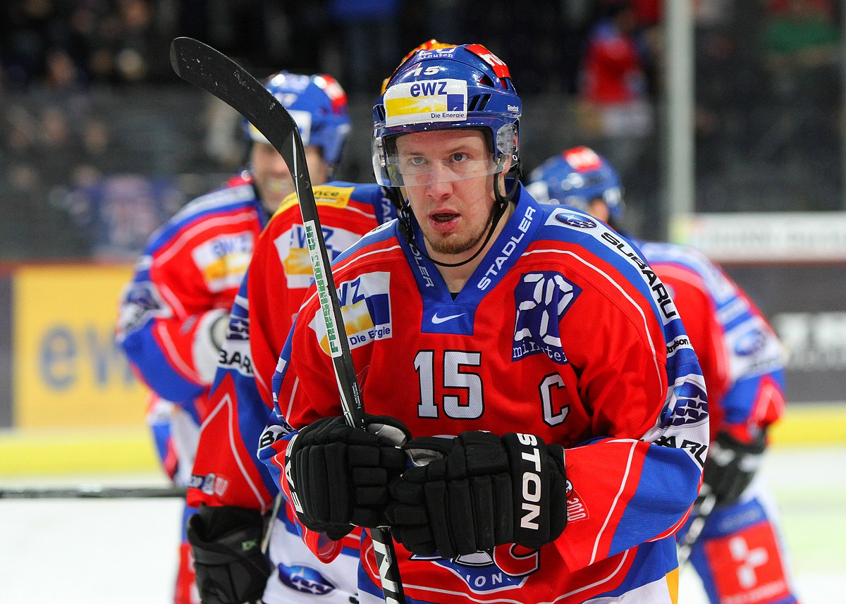 Le capitaine des ZSC Lions Mathias Seger lors d'un match contre les Rapperswil-Jona Lakers, 12 décembre 2010.